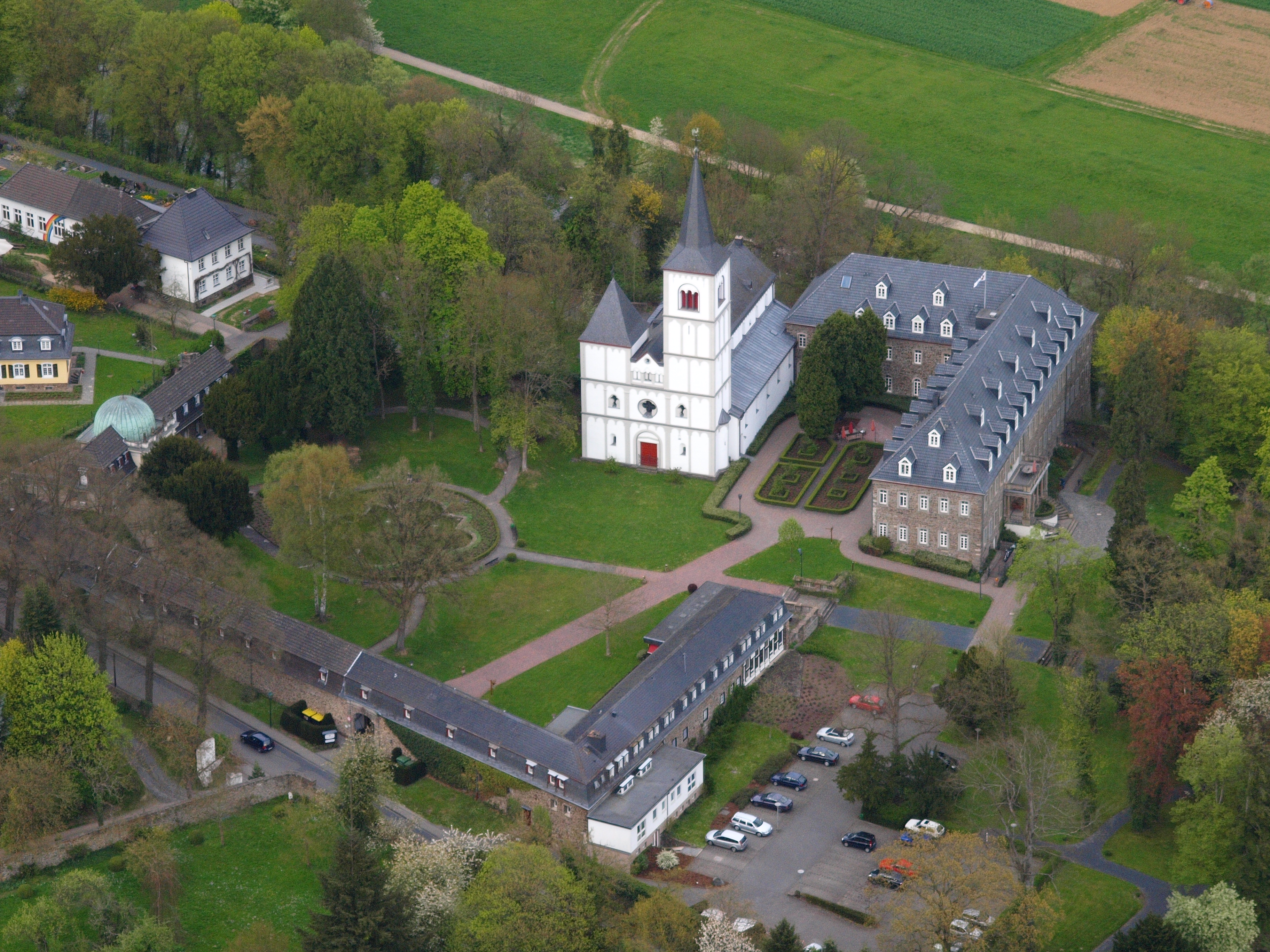 Das ehemalige Kloster Merten aus südwestlicher Ansicht.